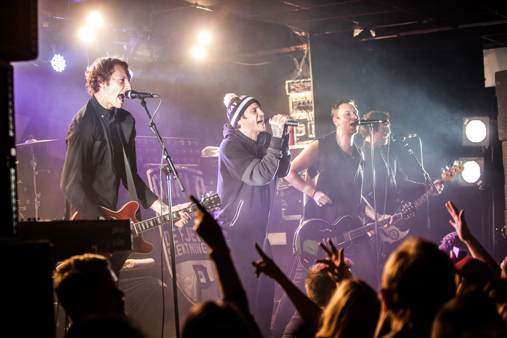 Fra konsert på Studenthuset UFO i Bodø